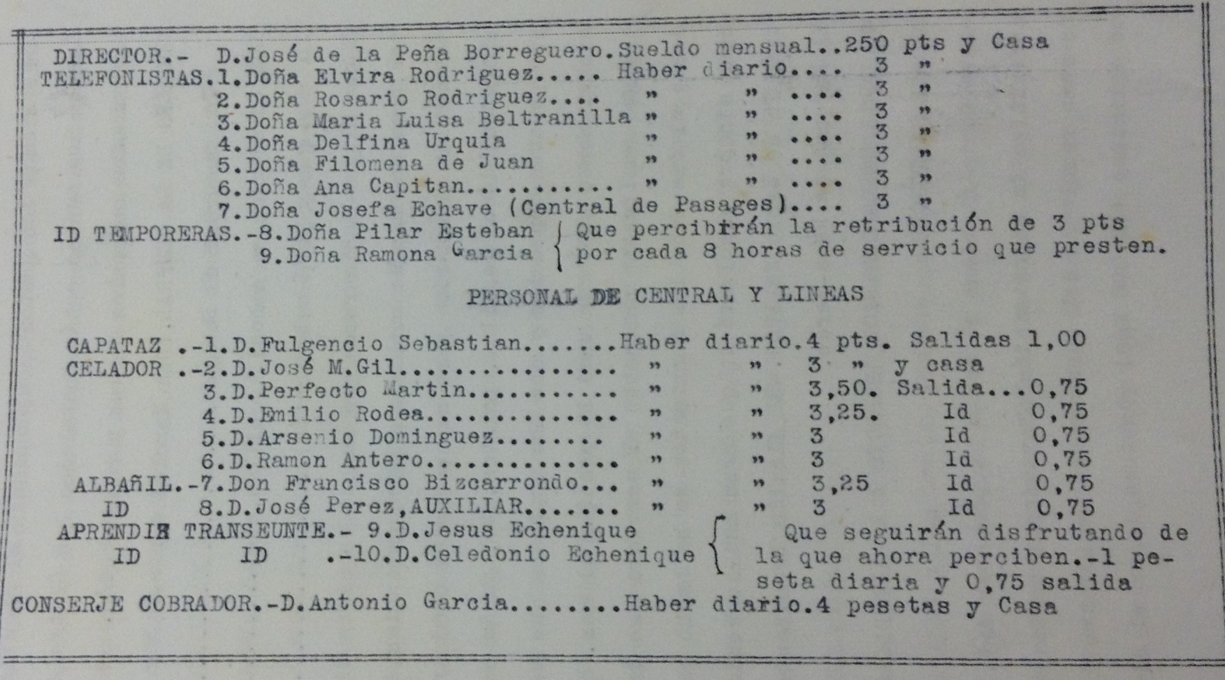 Listado de trabajadoras y trabajadores antiores a la concesión al Ayuntamiento de San Sebastian